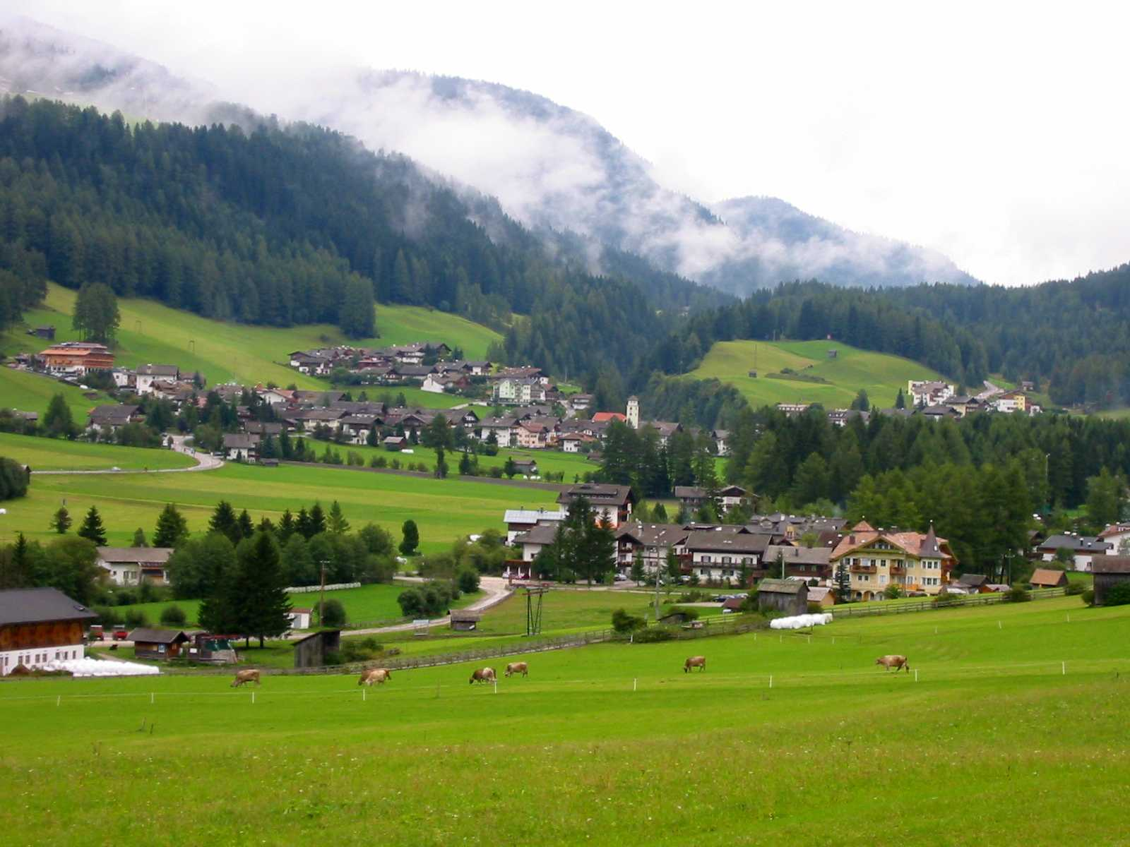 Moos in der Gemeinde Sexten, Südtirol / Moso nel comune di Sesto, Alto Adige Foto scattata in settembre 2004 da Fantasy :-)